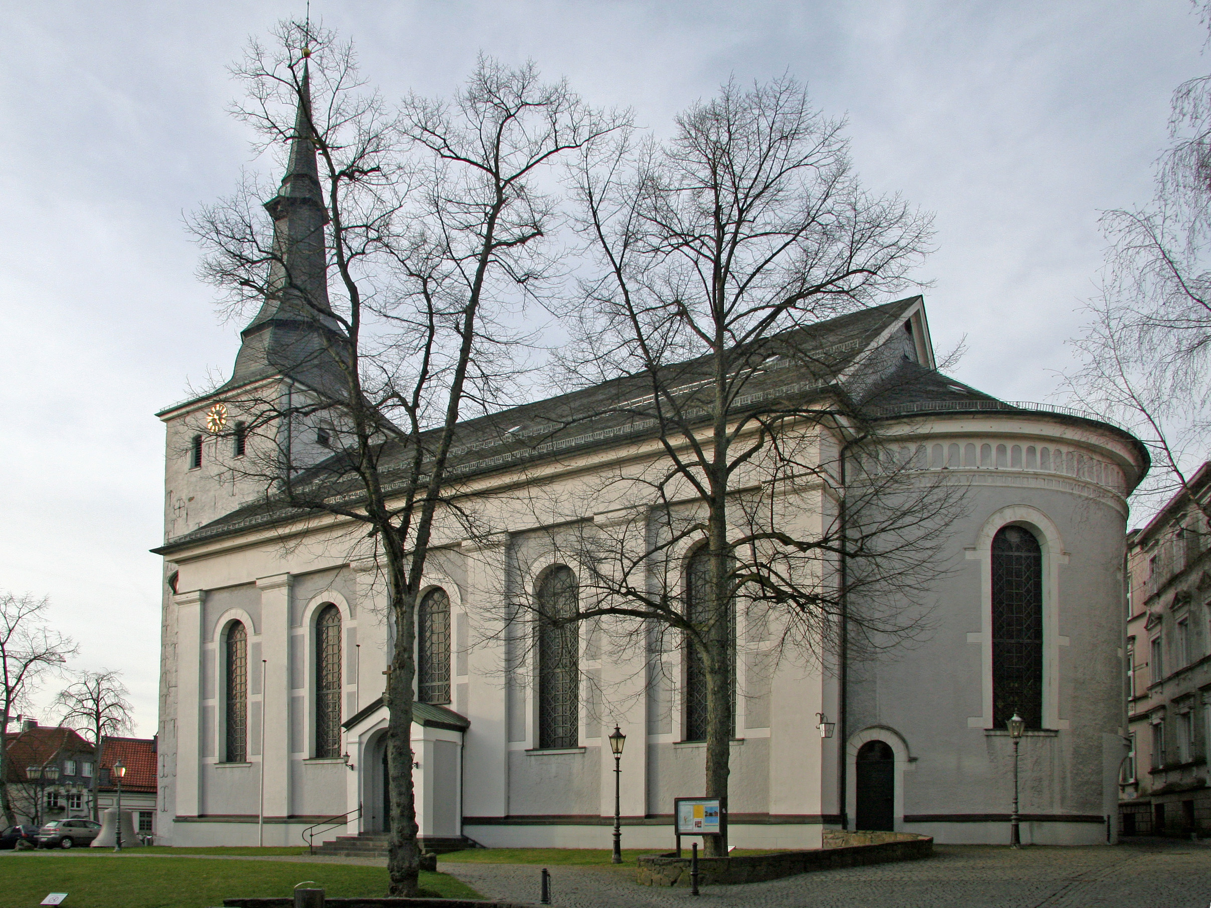 Südostansicht der Erlöserkirche in Lüdenscheid